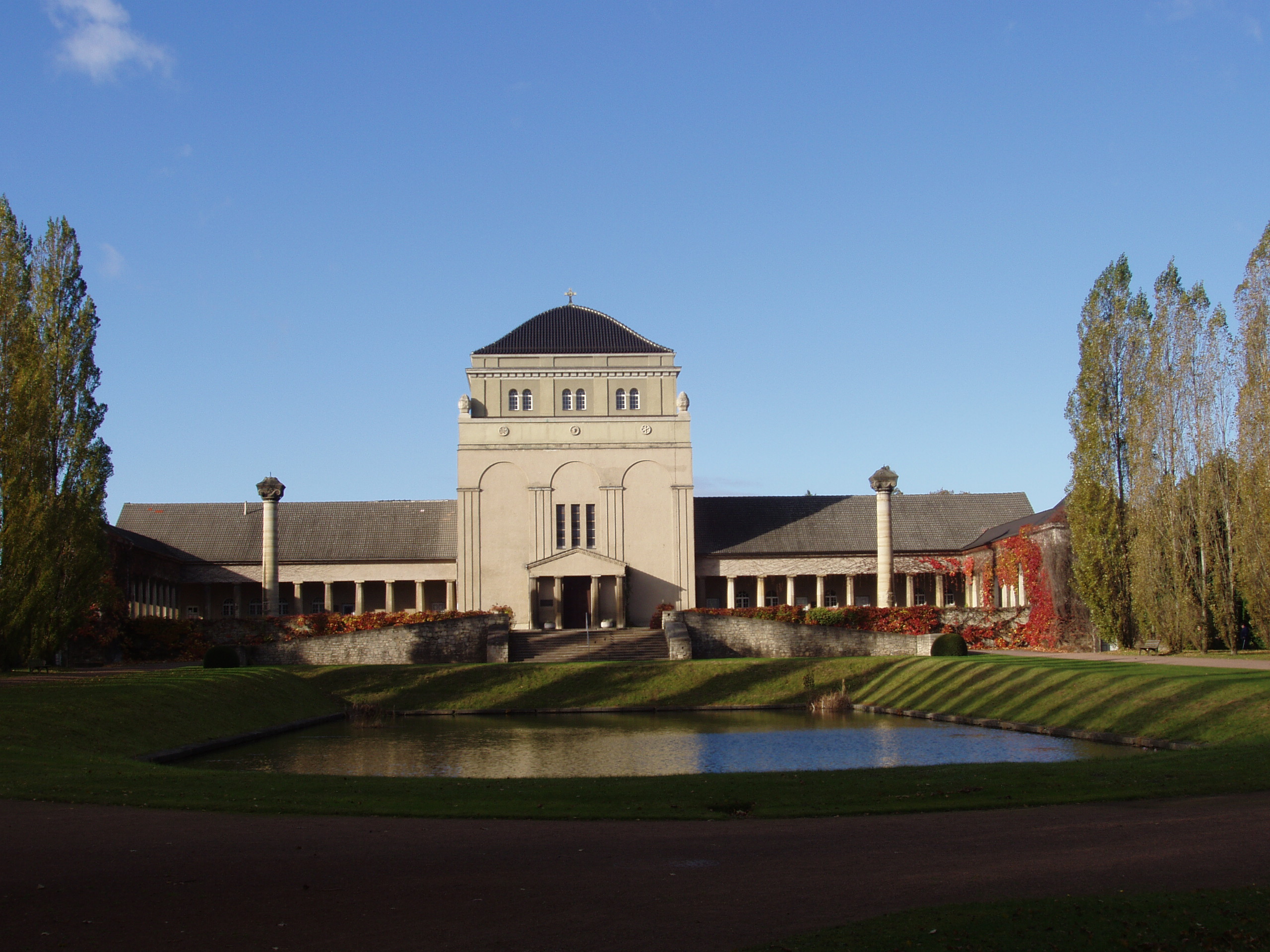 Zentralgebäude des Getraudenfriedhofes in Halle (Saale), Architekt: Wilhelm Jost, 1912-1914